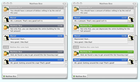 Exemple d'une fenêtre de conversation avec Adium avec le thème Stockholm